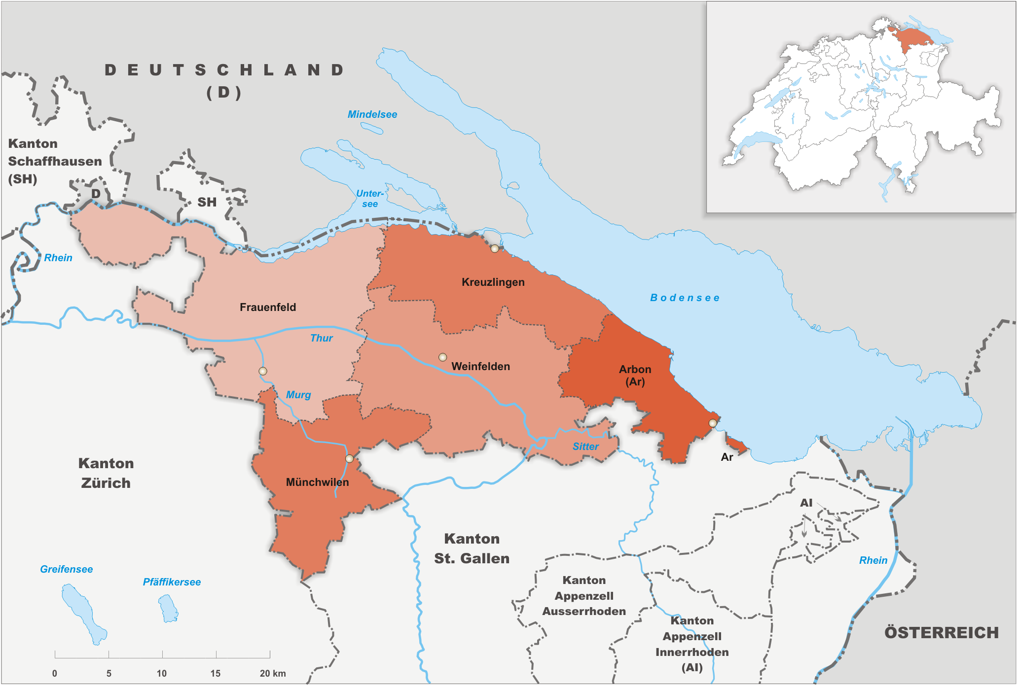 Bezirke des Kanton Thurgau ab 2011.